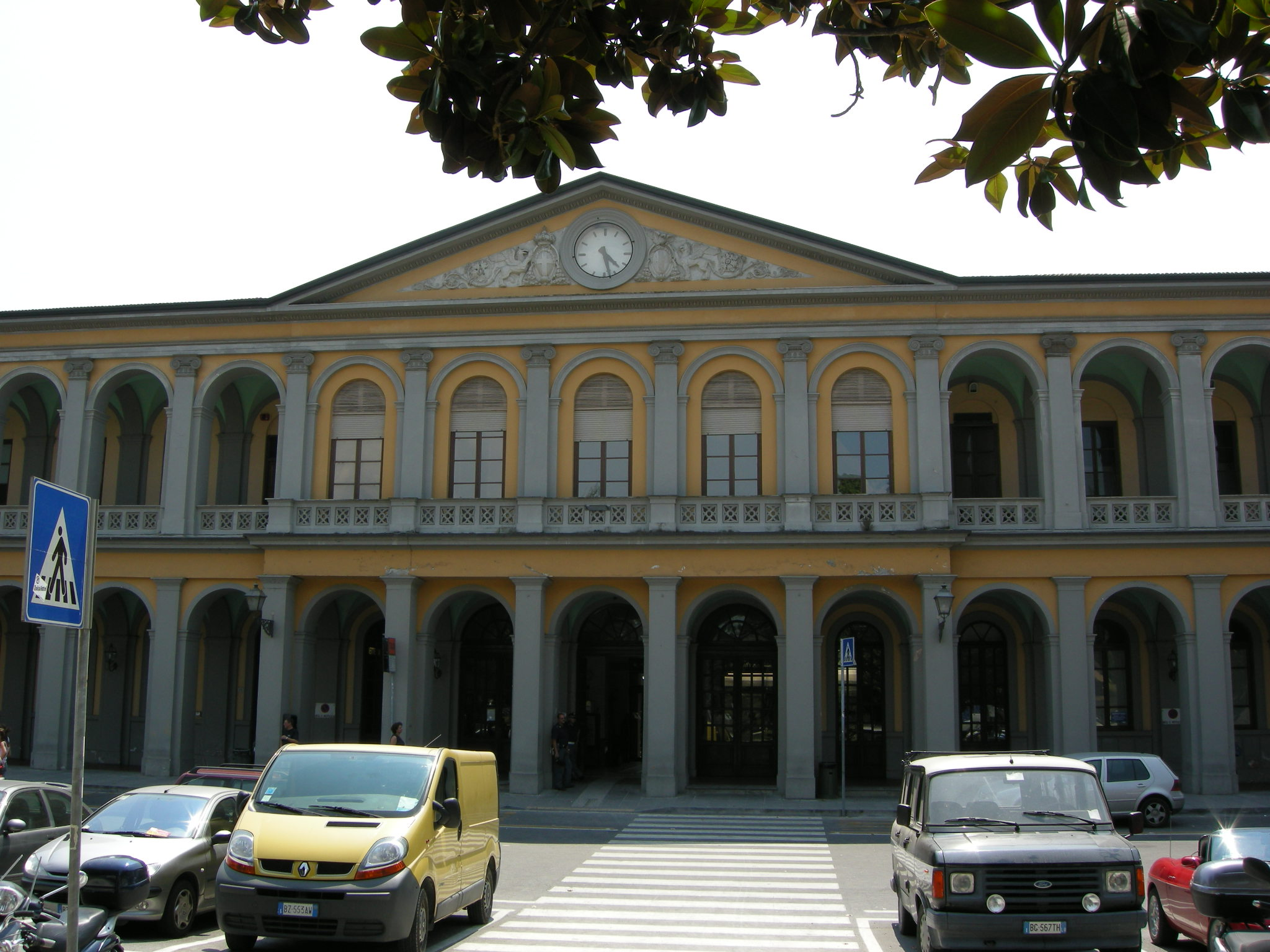 Stazione di lucca